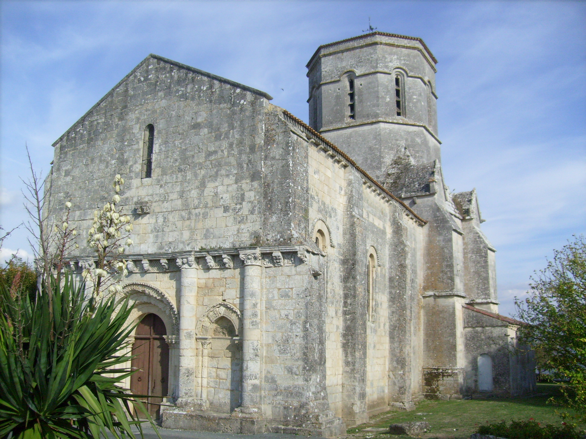 Eglise de Rétaud